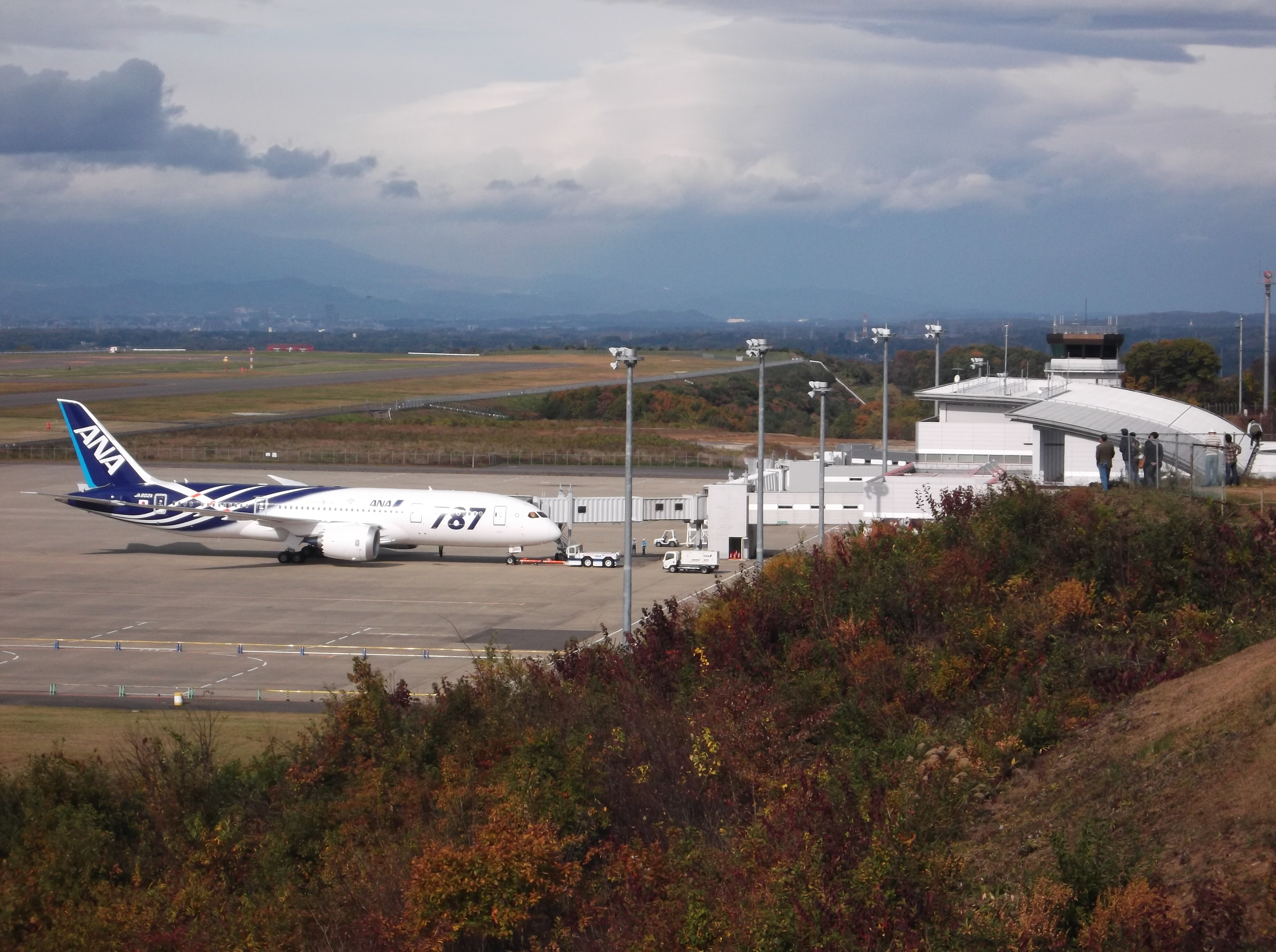 福島空港に初めて飛来したボーイング787、展望台から撮影。